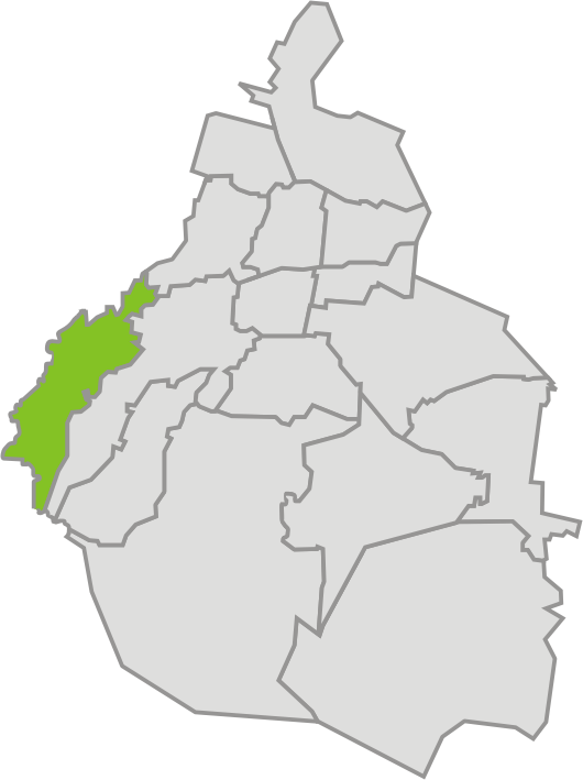 Mapa de localización de la delegación Cuajimalpa de Morelos, Distrito Federal, México